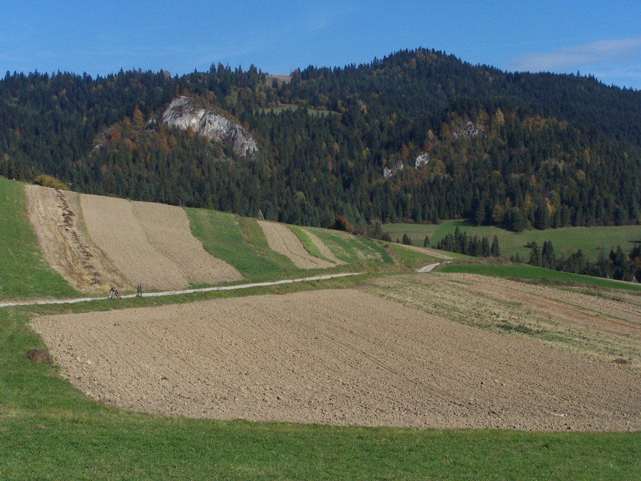 Pieniny Czorsztyńskie, widok ze Sromowiec Wyżnych. U góry Macelak, na dole dwie turnie:Rabsztyn i Stronia